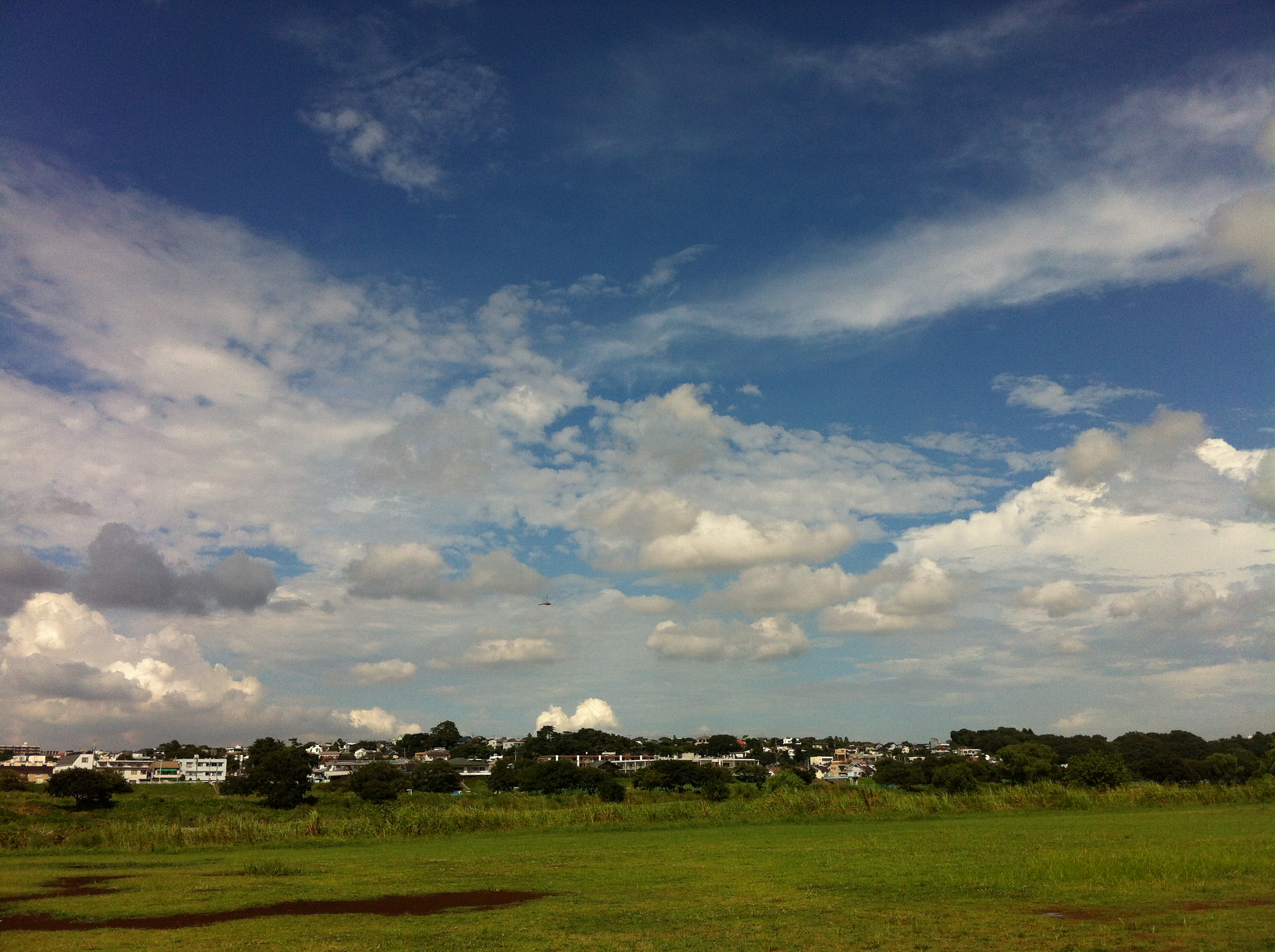 1 Chome Tamazutsumi, Setagaya-ku, Tōkyō-to 158-0087, Japan